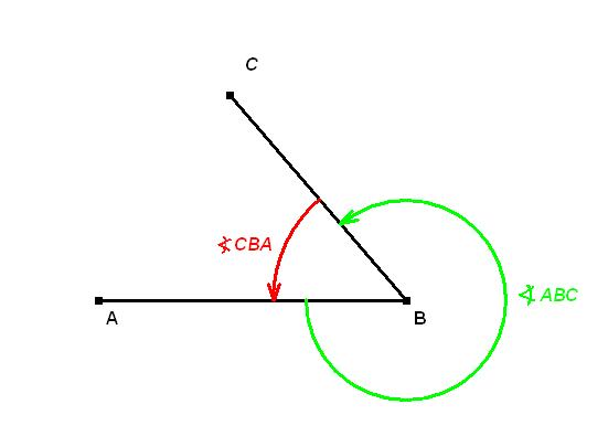 Winkelbezeichnung im mathematischen Sin